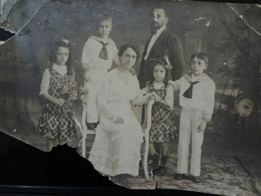 Familia de Enrique Vigil Chopitea antes de viajar a Barbados por el proceso de colombianización en Leticia.